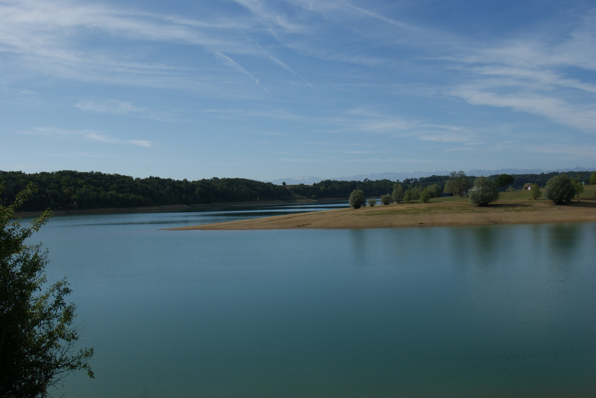 Foto van de noordzijde van het Lac de la Gimone in de Gers (Frankrijk).Genomen:06-09-2011.